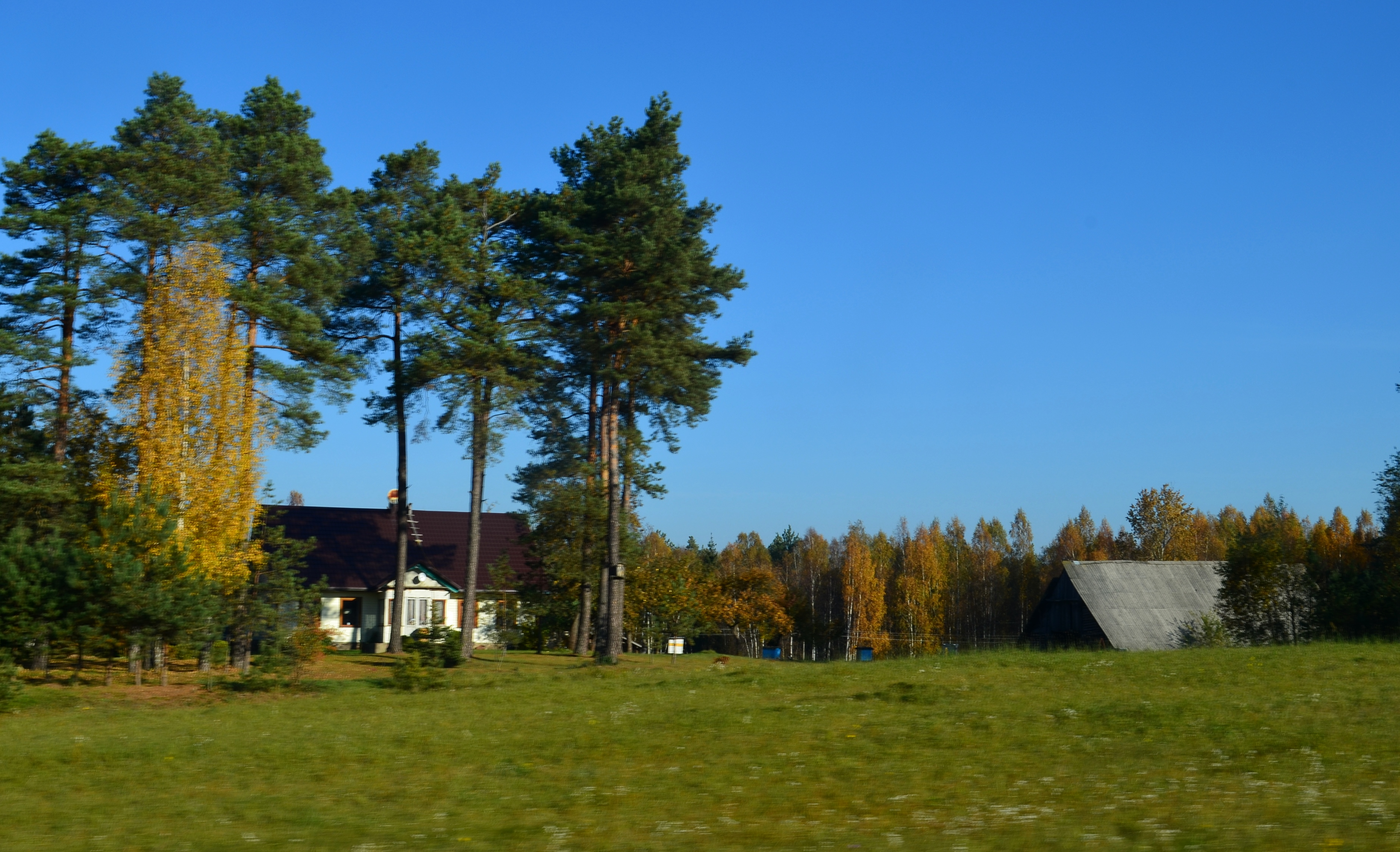 Cezariškiai, Molėtų raj.